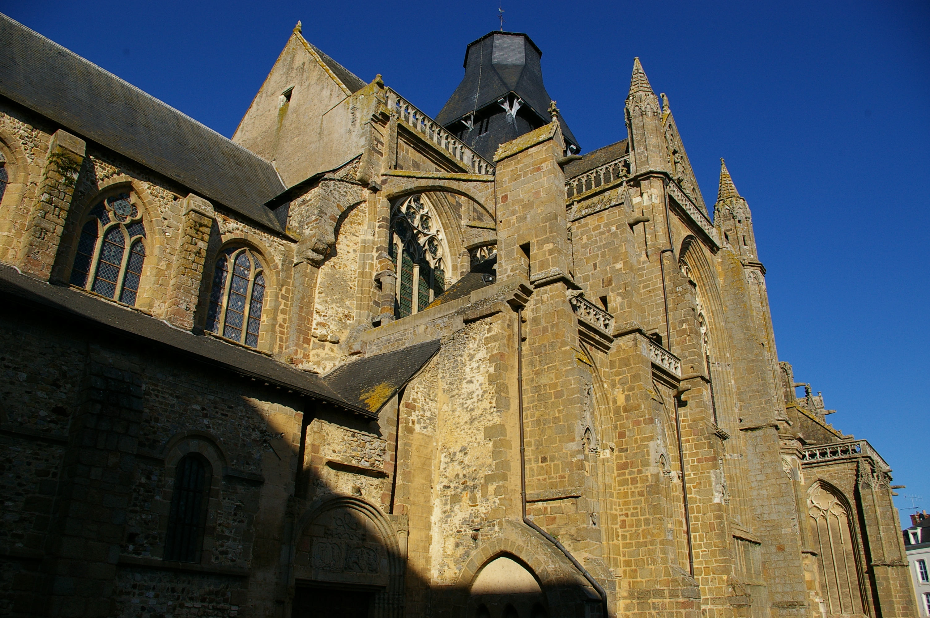 Basilique d'Evron (Mayenne)